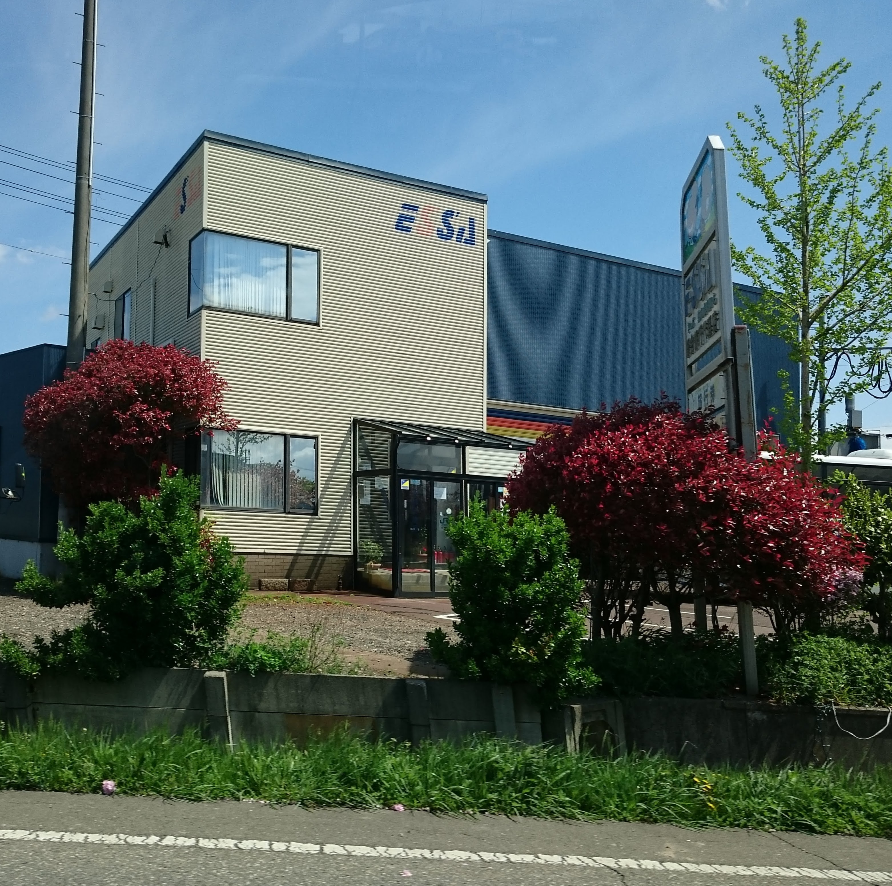 越佐観光の本社外観